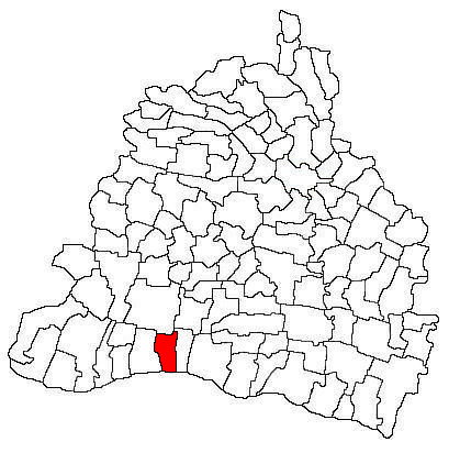 Amplasarea în cadrul județului.